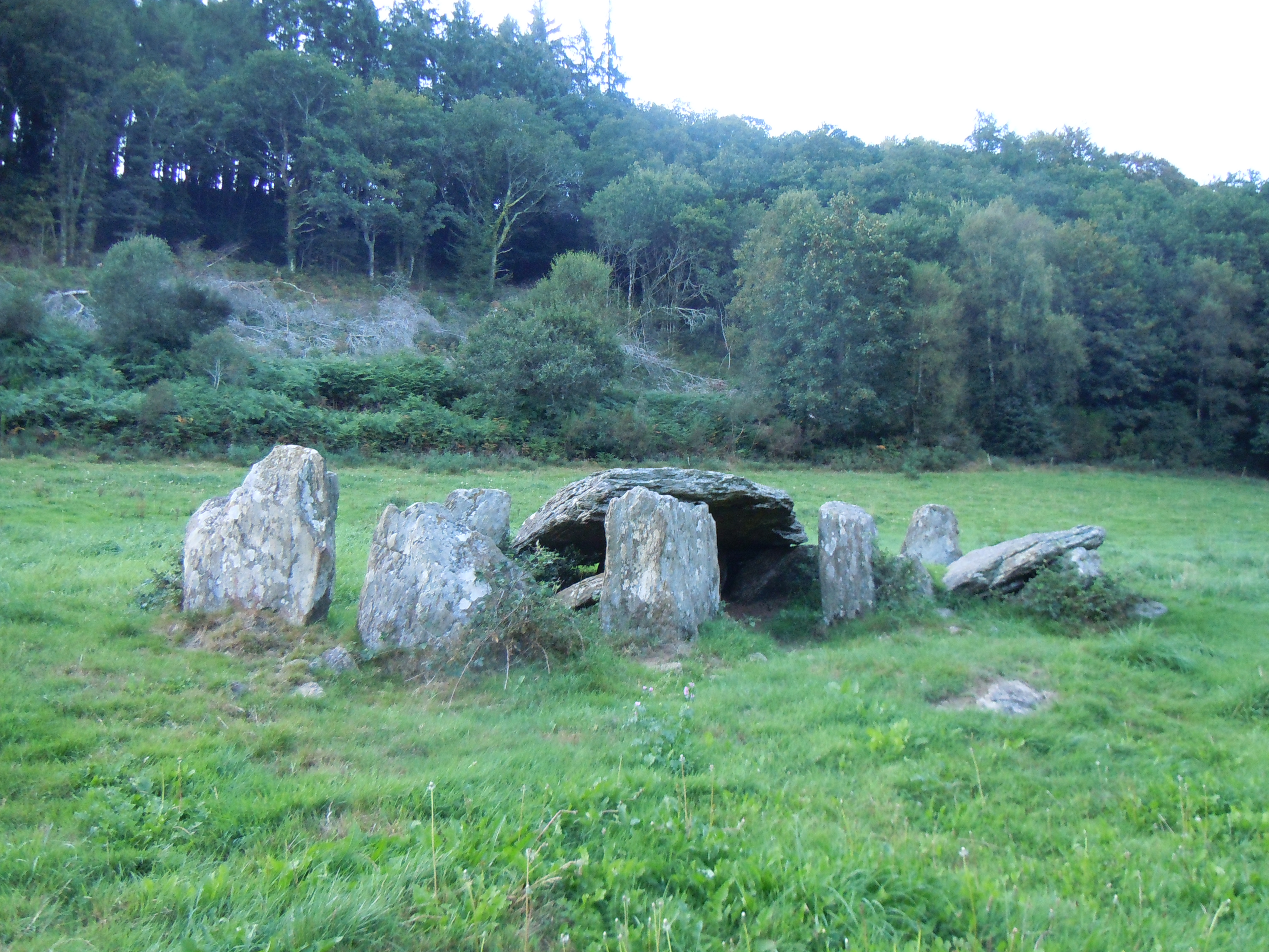 Allée couverte de Menguionnet, commune de Gourin, département du Morbihan, France